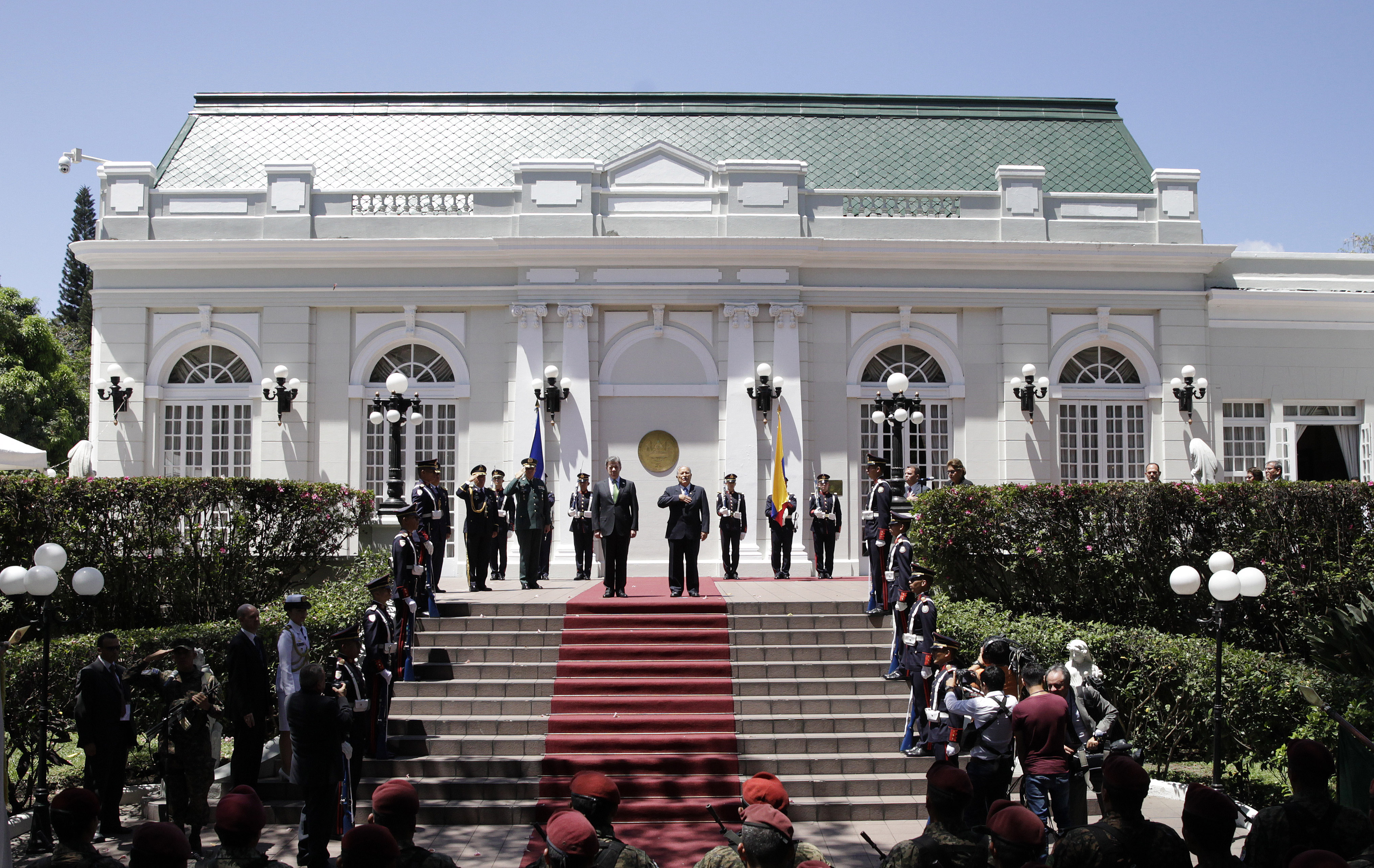 Presidente de Colombia , Juan Manuel Santos y Presidente Salvador Sánchez Cerén.